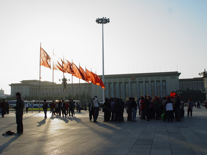 天安门广场